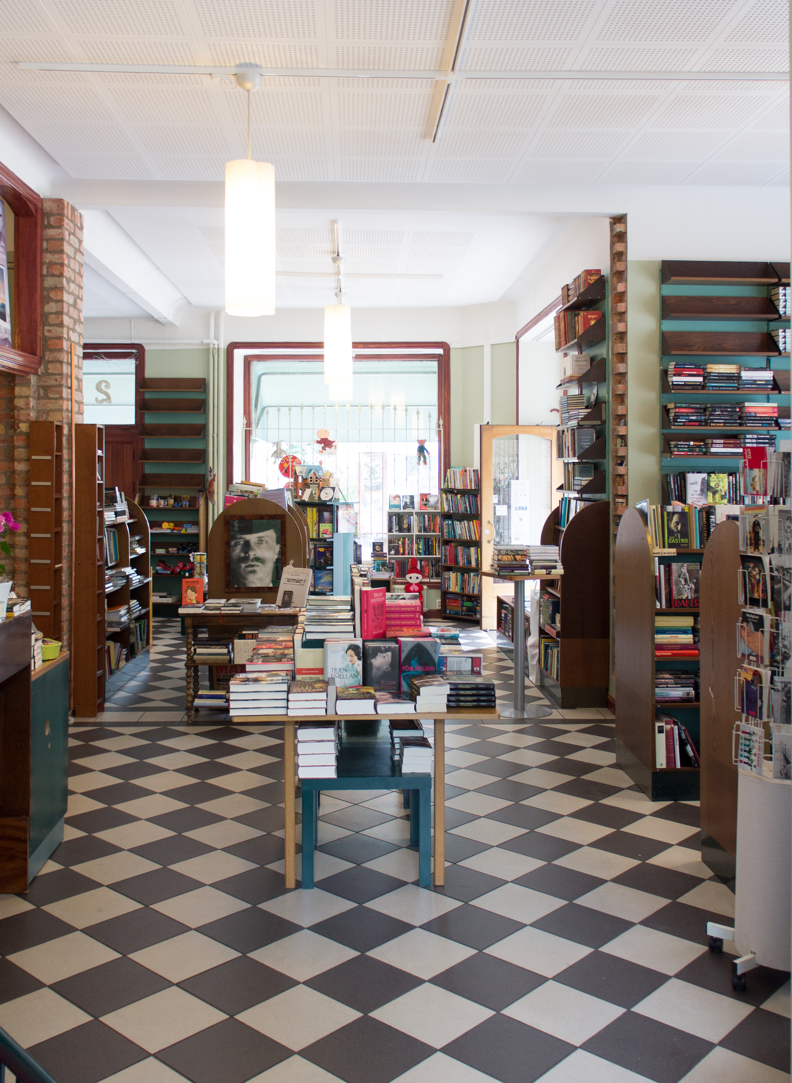 Interiör från Partille Bokhandel i juli 2012, Göteborgsvägen 75 i Sävedalen, Partille kommun.